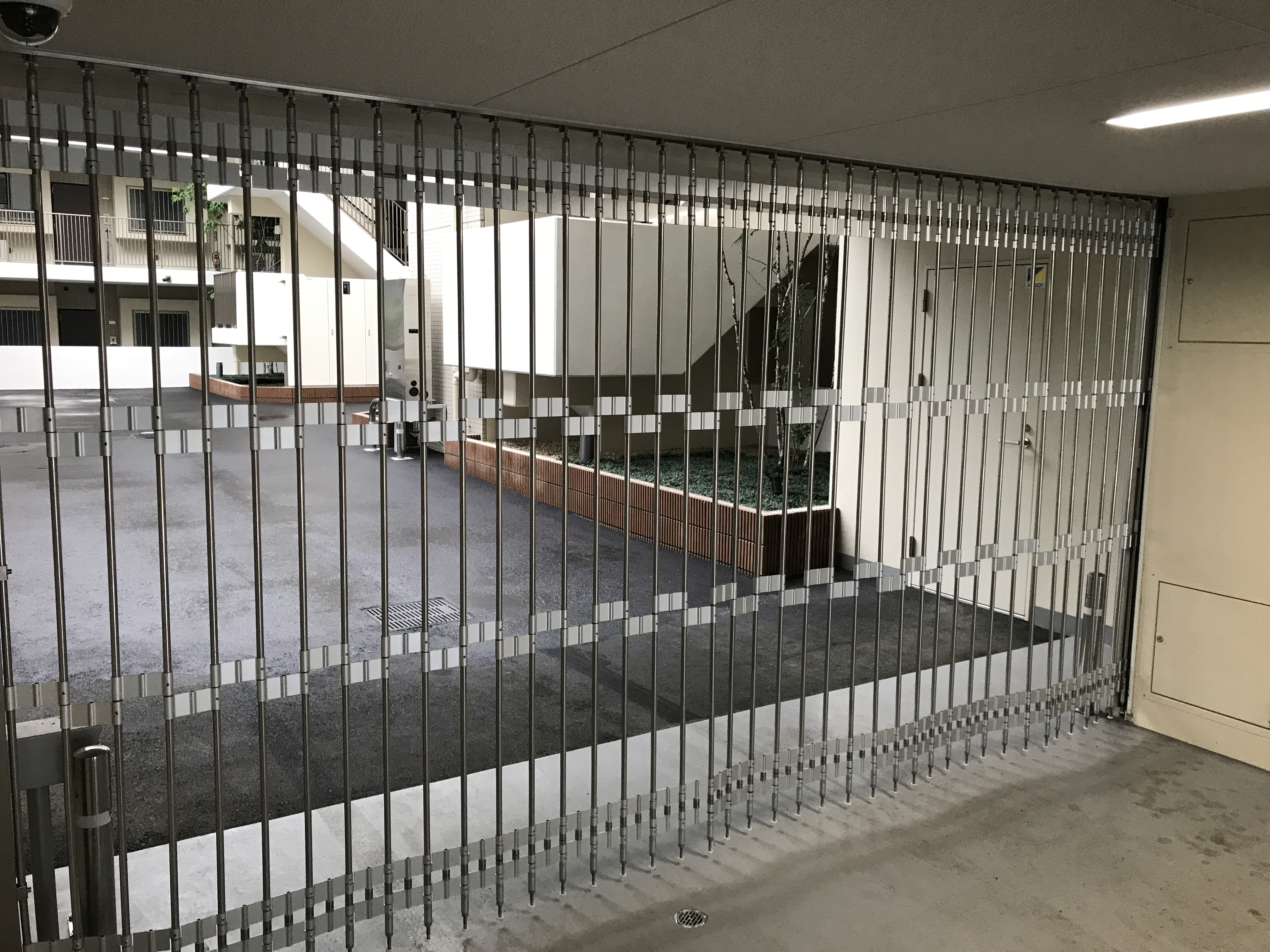 株式会社横引シャッター製品